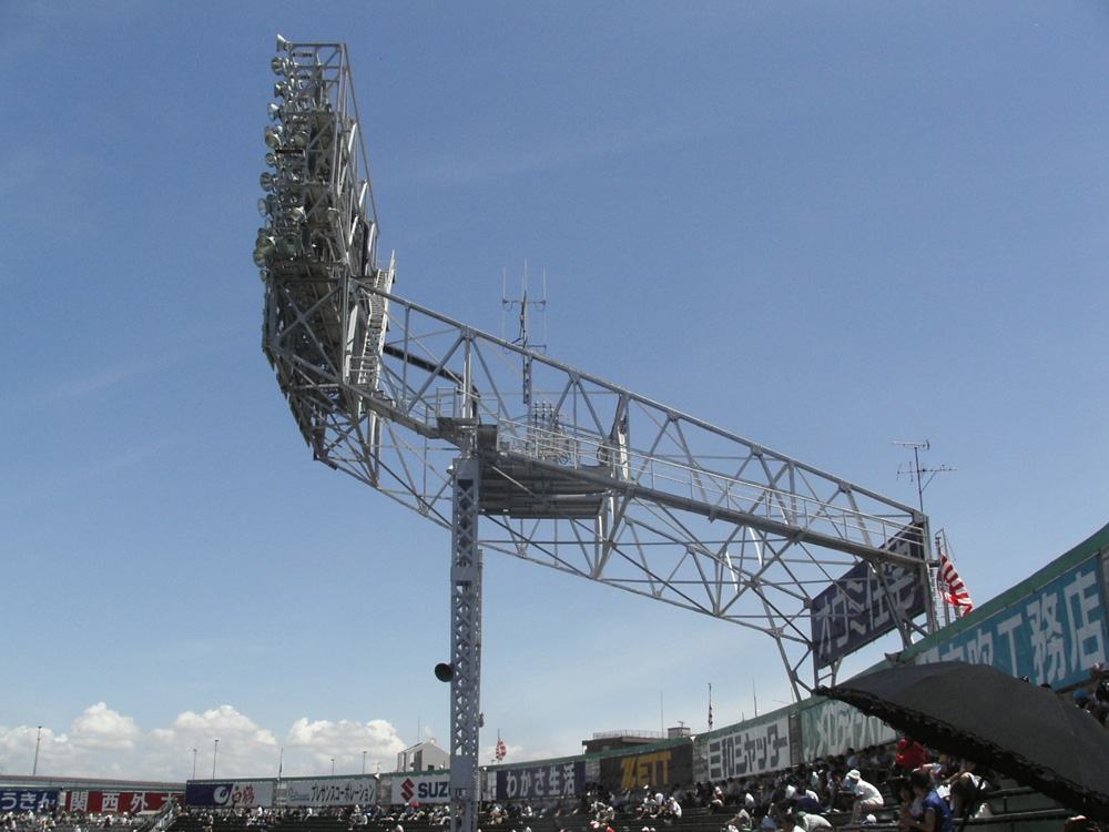 Hanshin Koshien Stadium